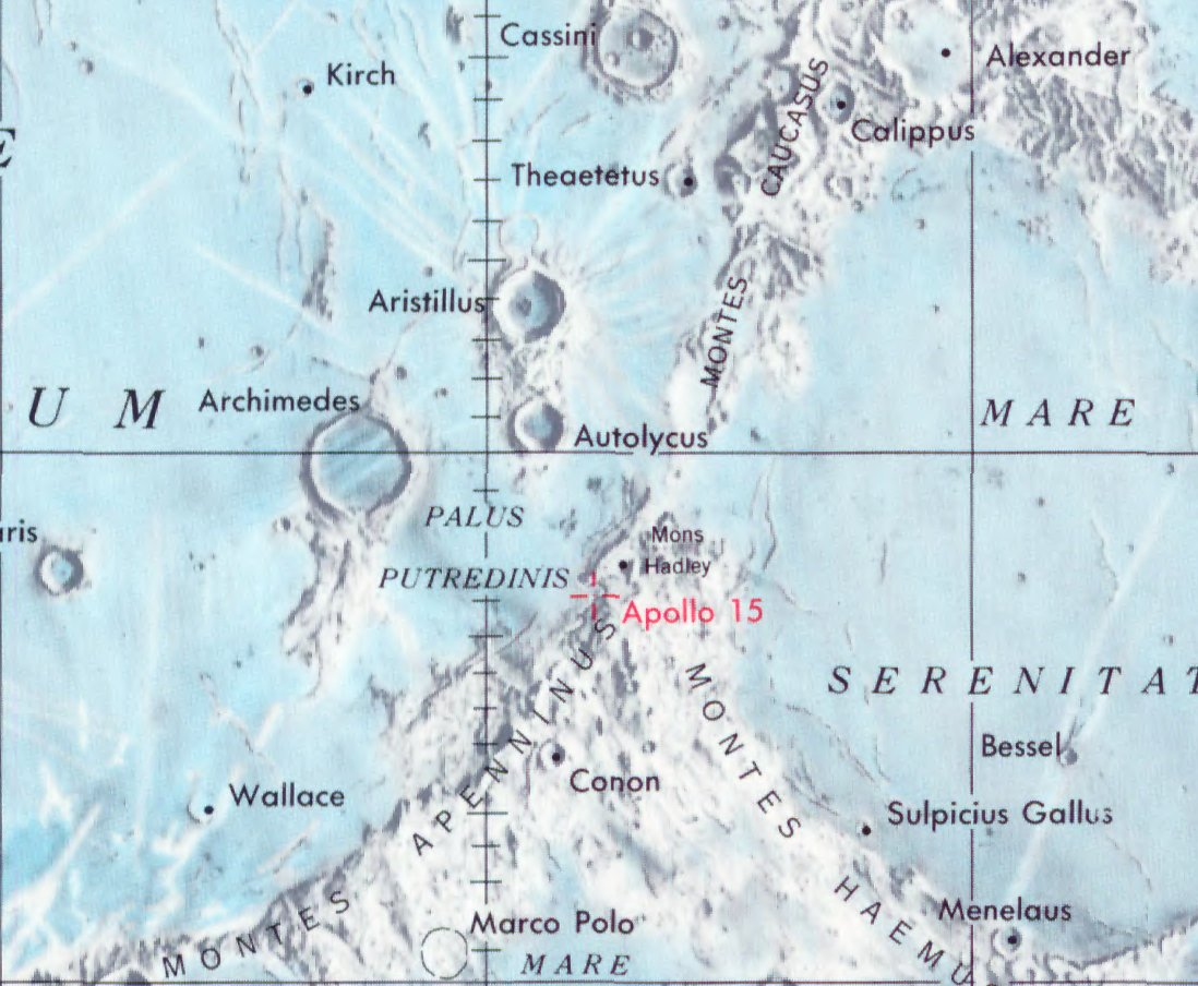 Localización del lugar de aterrizaje del Apolo 15. (Lunar Chart LPC1. Second Edition)